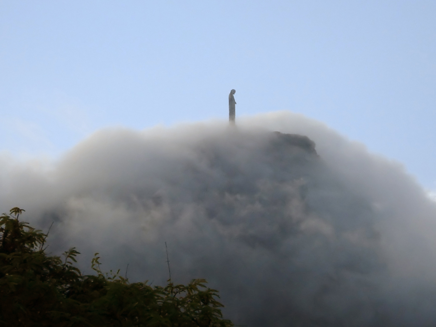 O Cristo em uma bela paisagem.